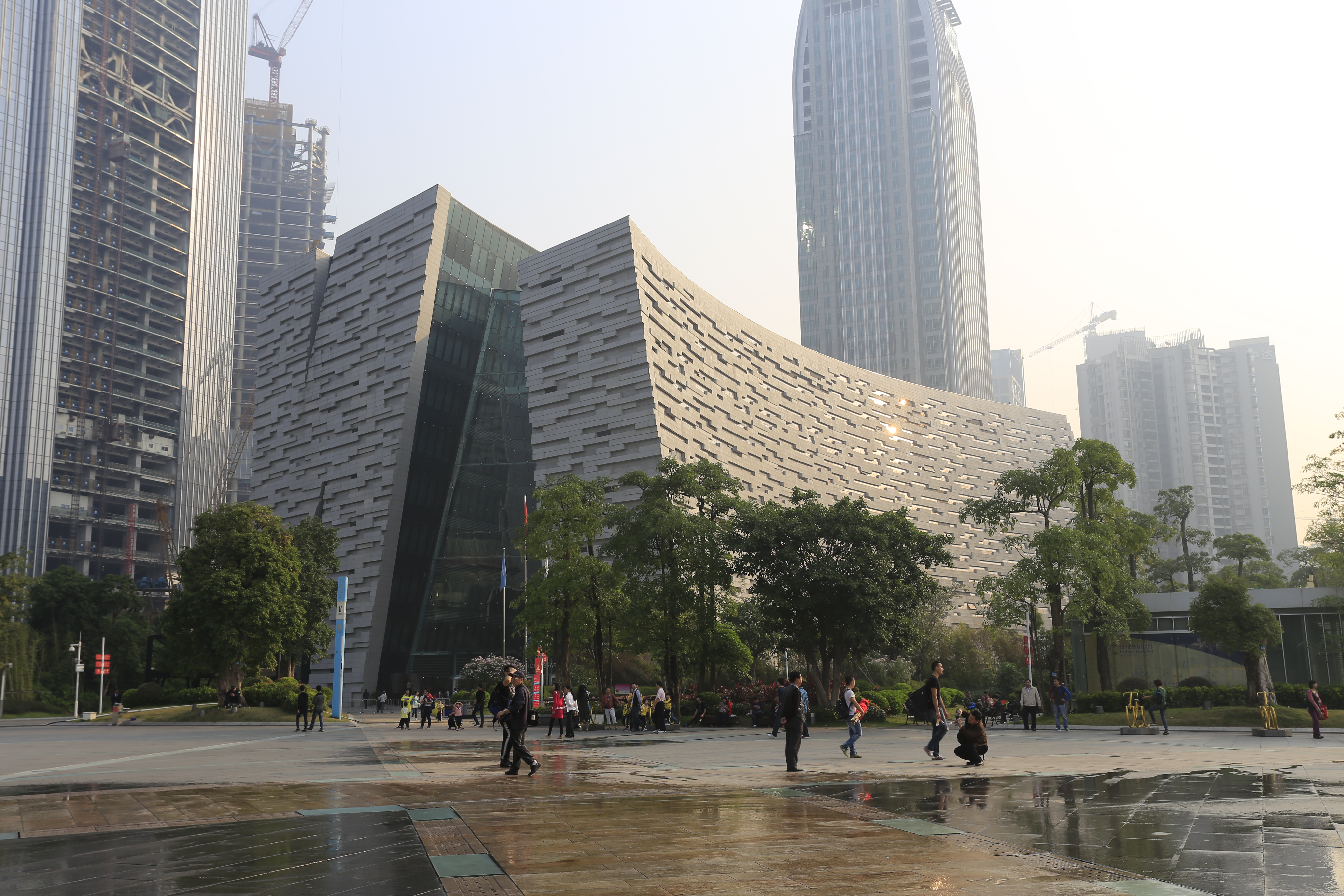 三元塔 (德庆)